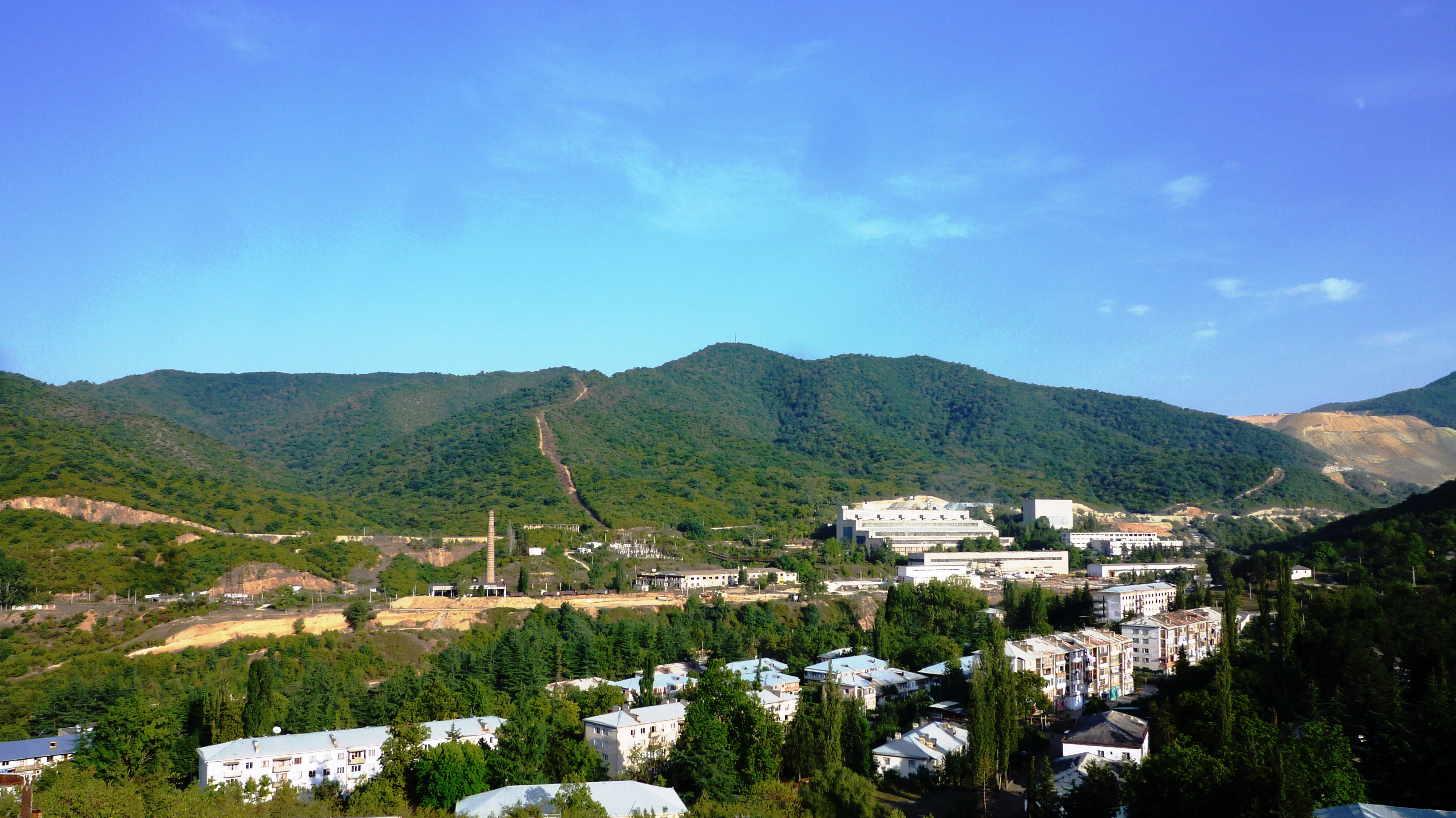 კაზრეთი მადნეული